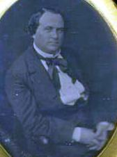 Daguerrotypie von 1855